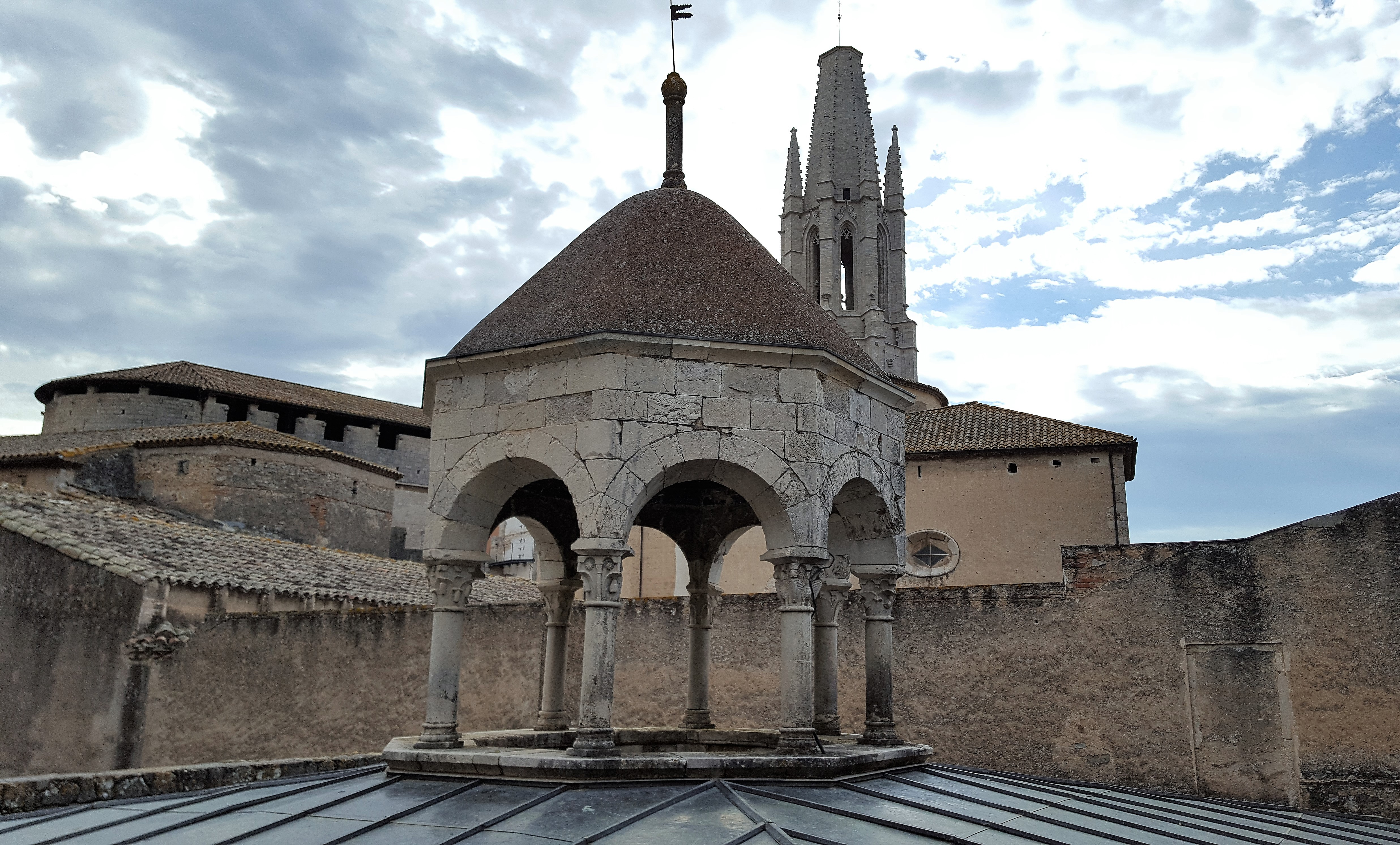 Arabische Bäder in Girona: Laterne (Kuppel) von außen fotografiert